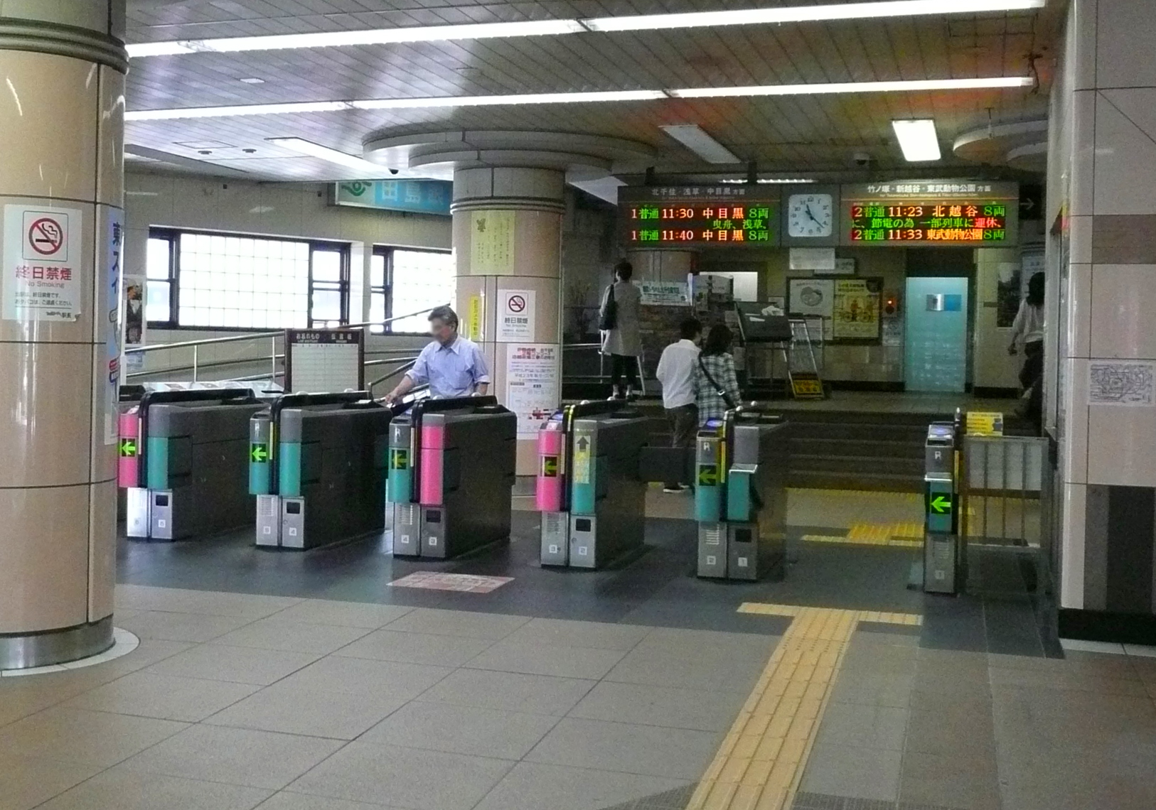 五反野駅改札口